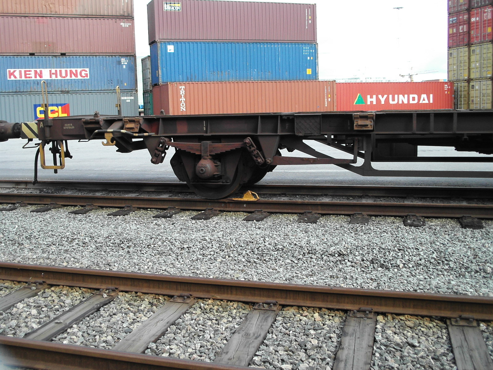 Bromssko